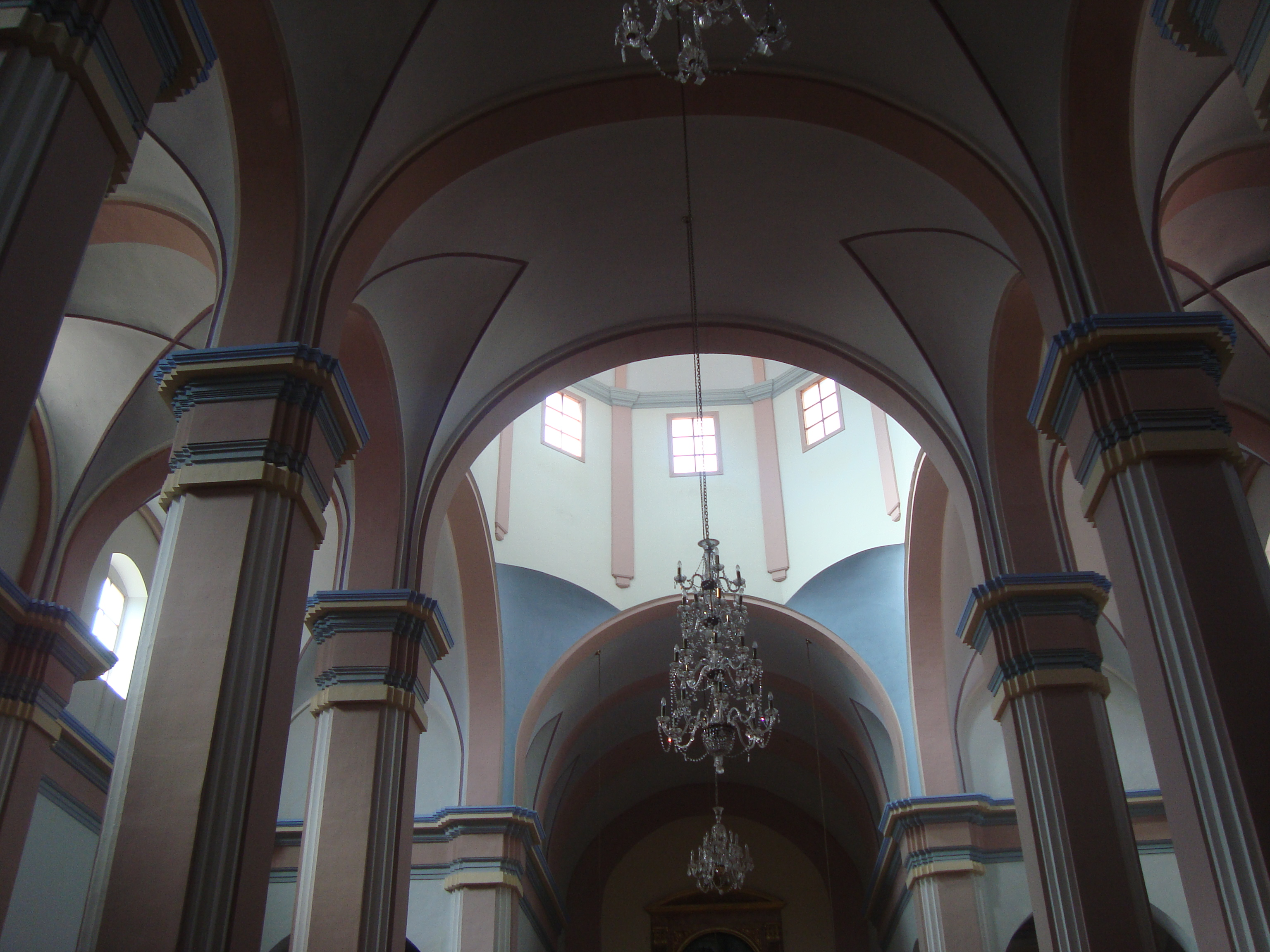 Iglesia parroquial de San Juan Bautista (Mas de las Matas)